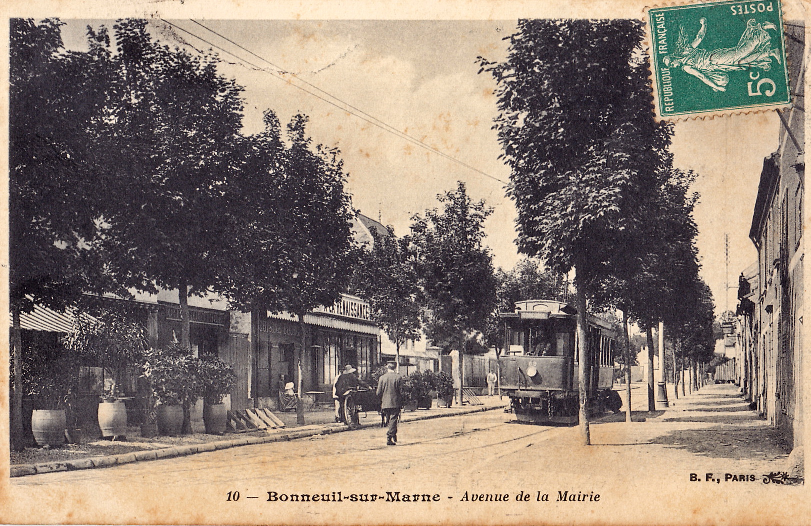 Carte postale ancienne éditée par BF à Paris, n°10 :BONNEUIL-SUR-MARNE - Avenue de la Mairie